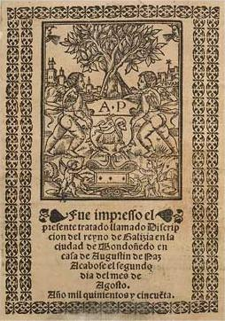 Descripcion del Reyno de Galizia y de las cosas notables del